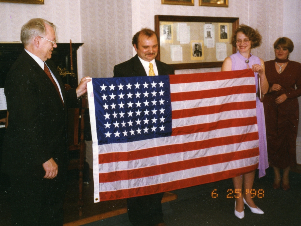 Слева - посол США в России (1997-2001) Дж. Ф. Коллинз. В центре - директор "Музея дипломатического корпуса" Александр Владимирович Быков. На открытии двухзалов "Музея дипломатического корпуса"